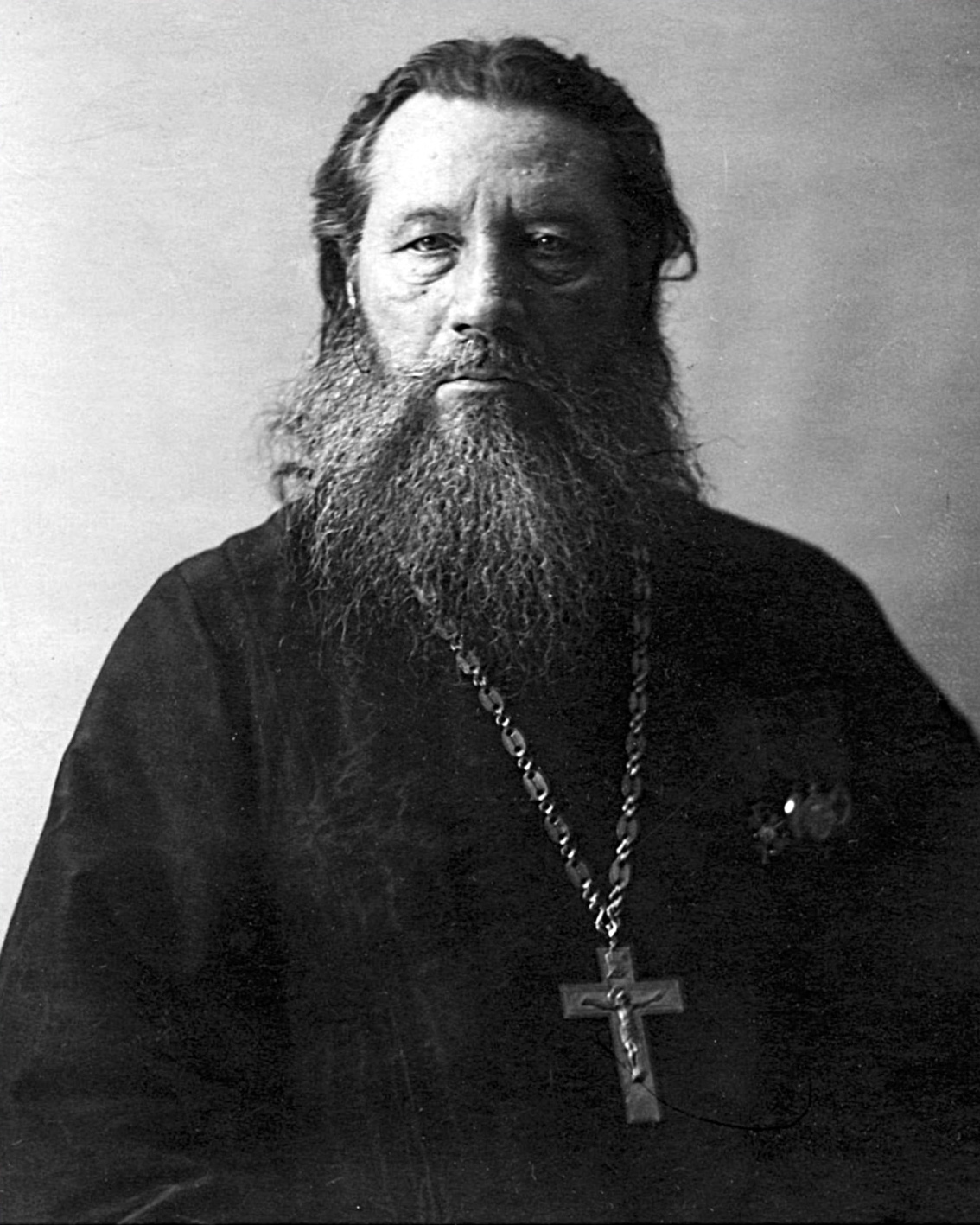 Гвоздев Иоанн Михайлович; ЦГАКФФД СПб [Фотодокументы], Г 370